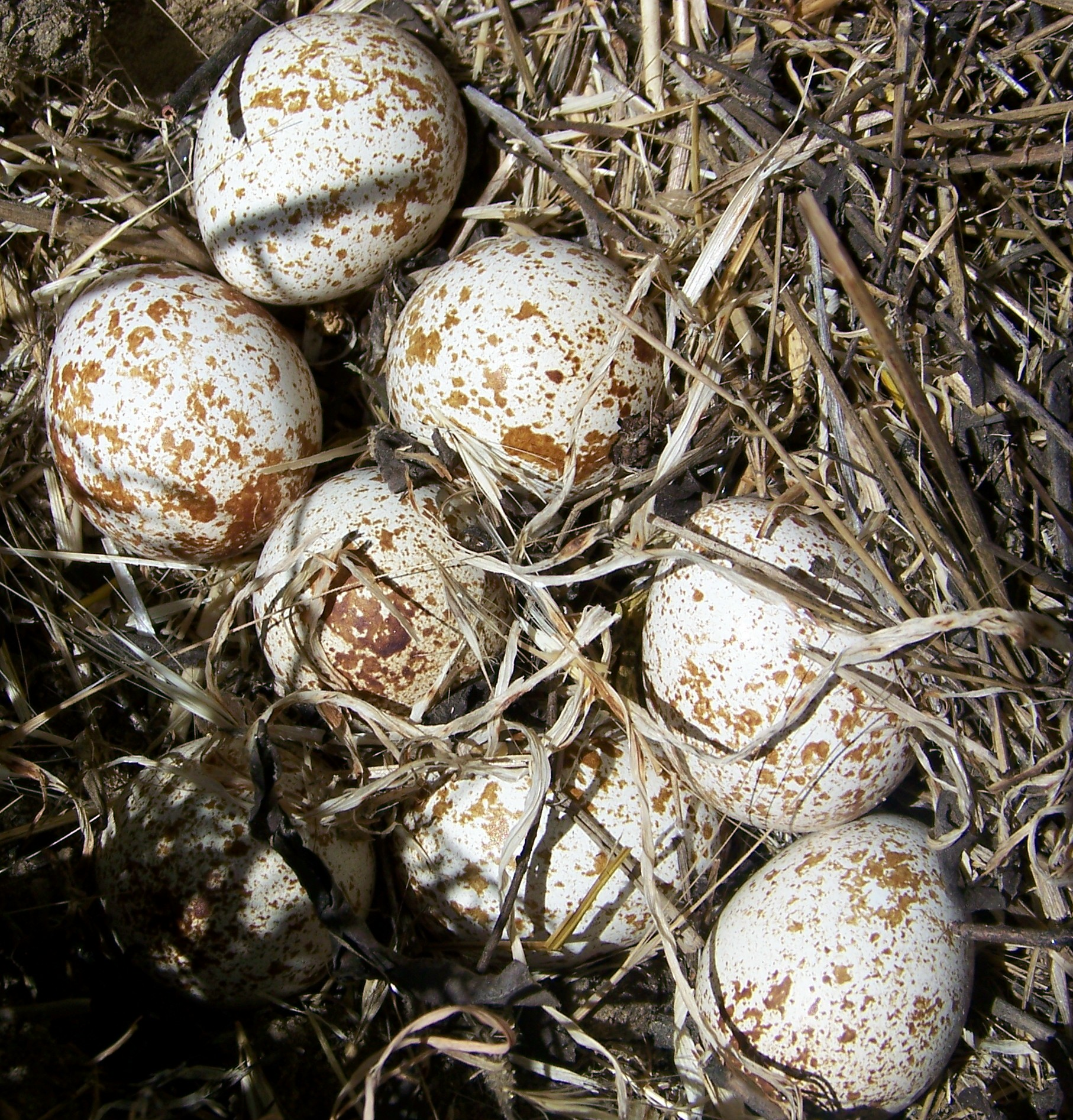 Several quail eggs.